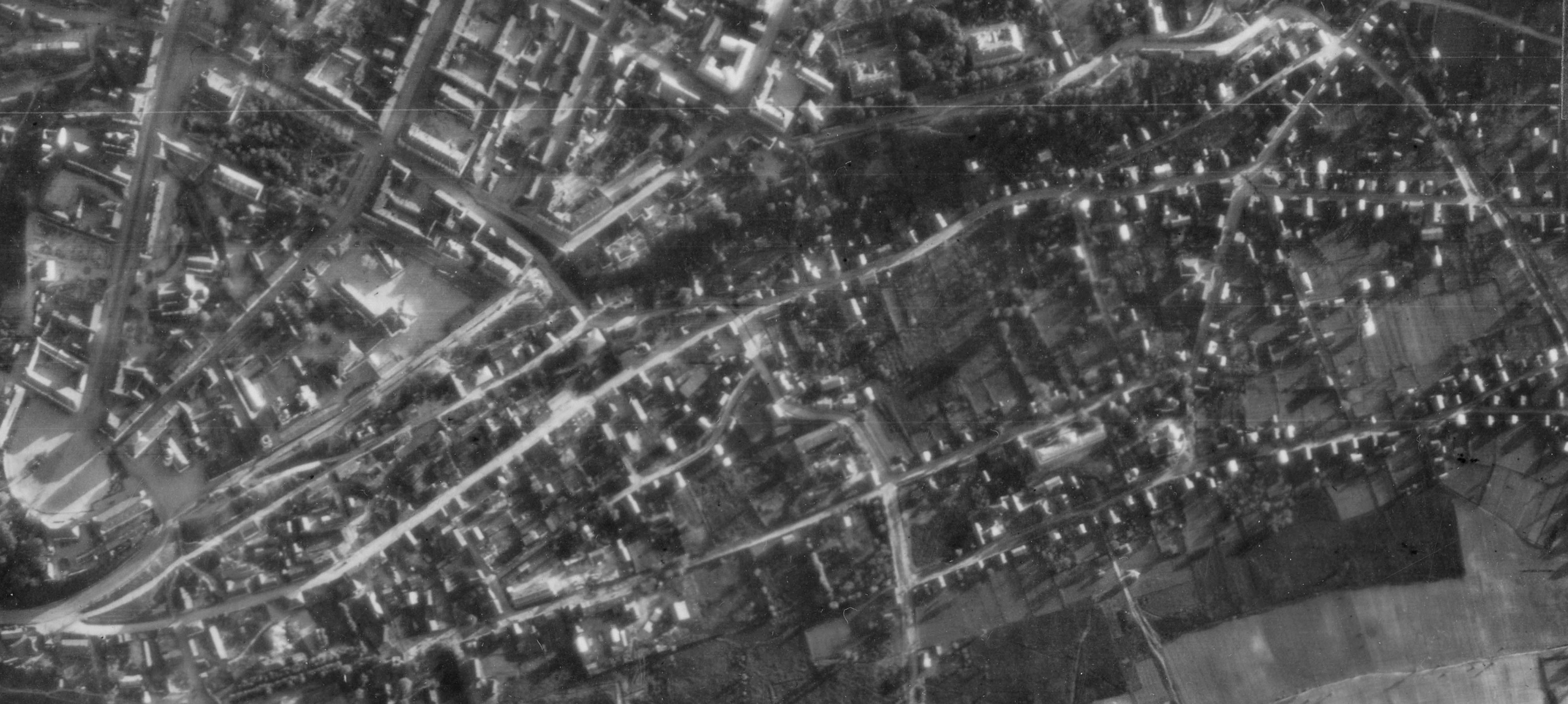 Магілёў. Нямецкі аэрафотаздымак